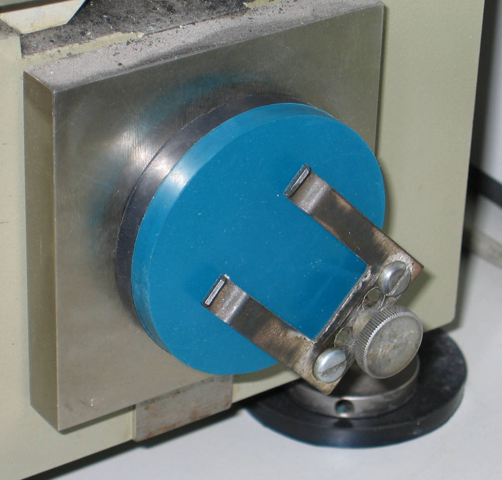 Rückprallelastizität, die eingespannte Probenplatte, auf die der Hammer auftrift